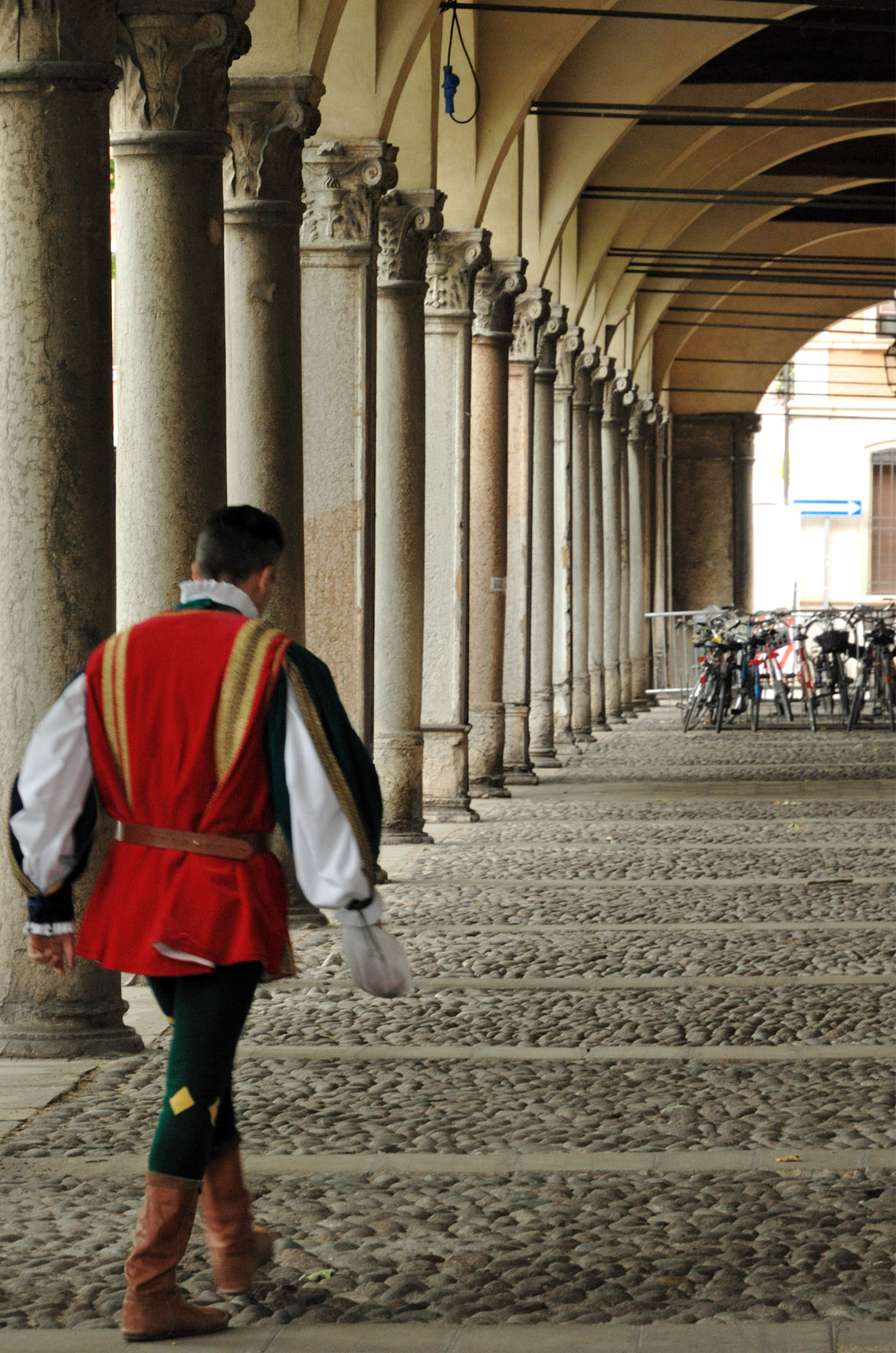 Portico della piazza Ariostea, Ferrara - Italia.